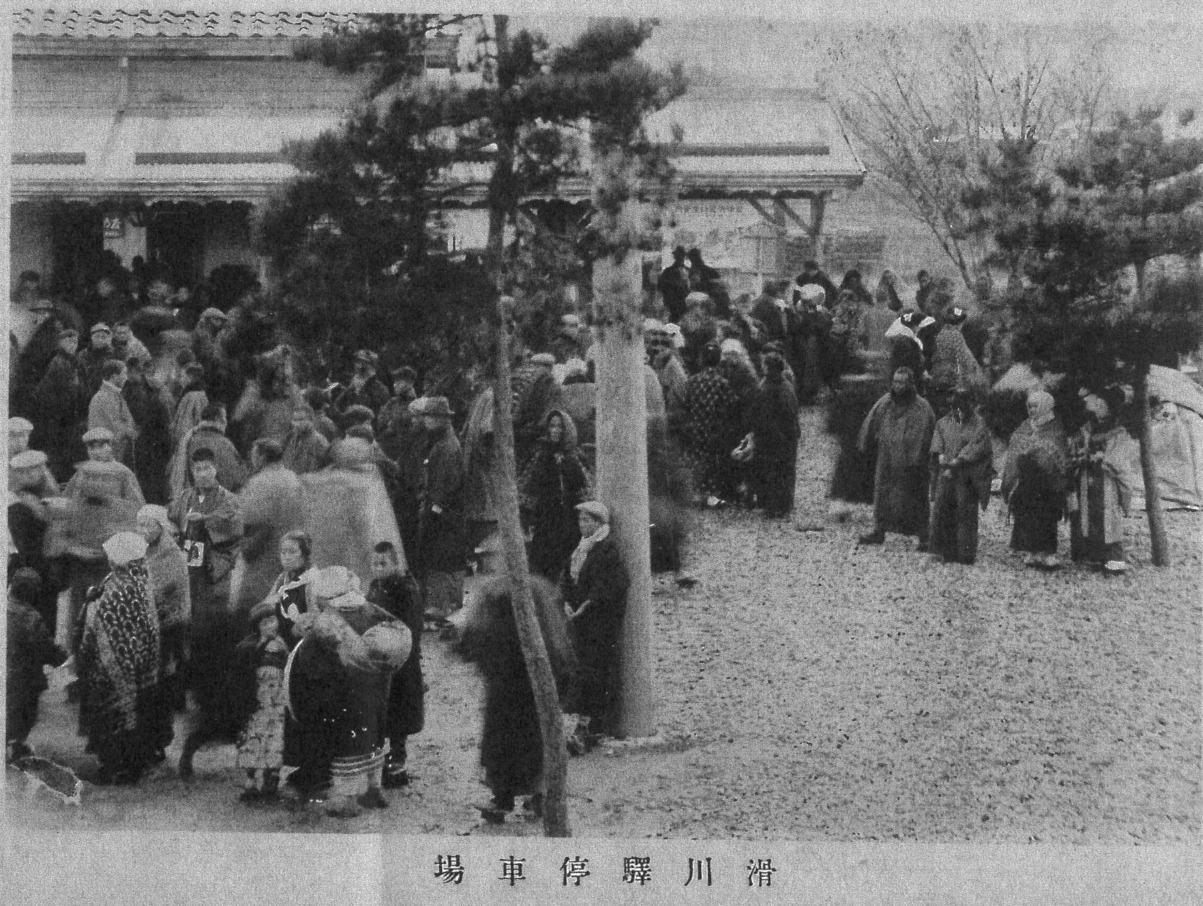 大正初年における北陸本線滑川駅前の様子